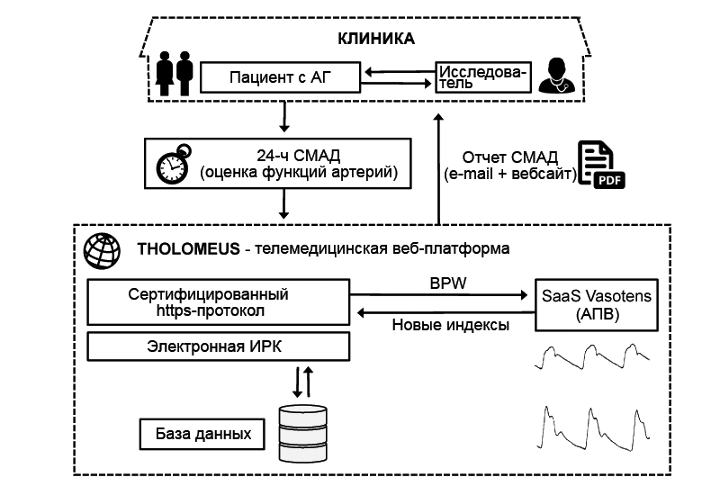 СМАД - суточное мониторирование артериального давления, ИРК - информационно-регистрационная карта, АПВ - анализ пульсовых волн, SaaS - software as a service.